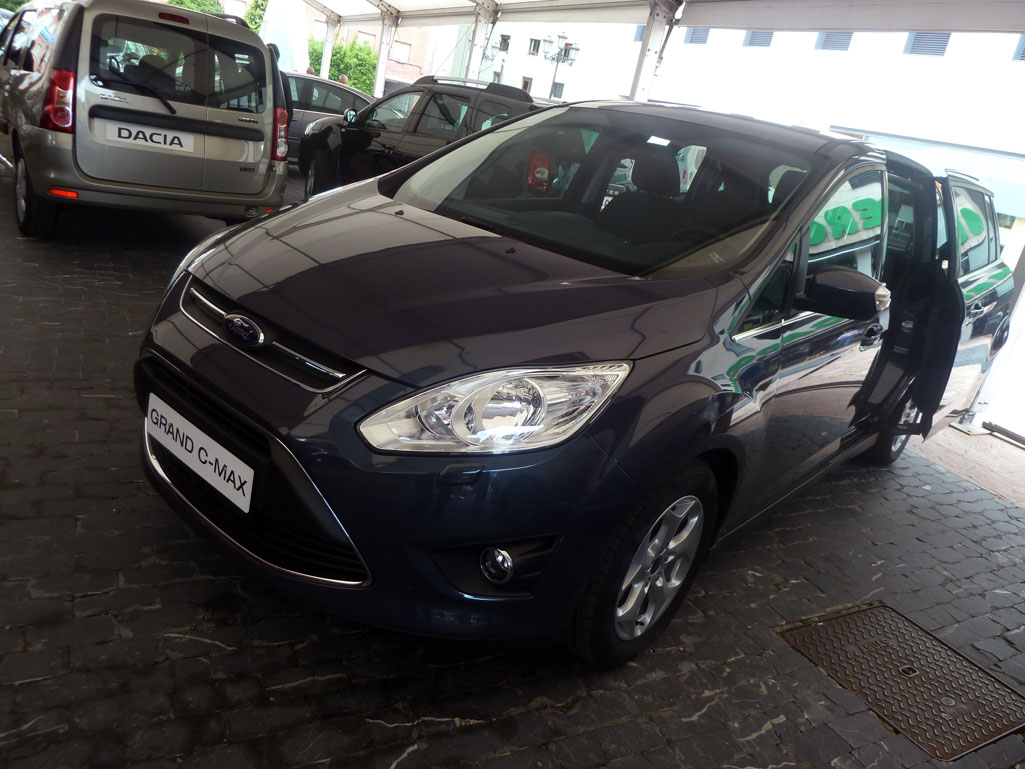 Ford España